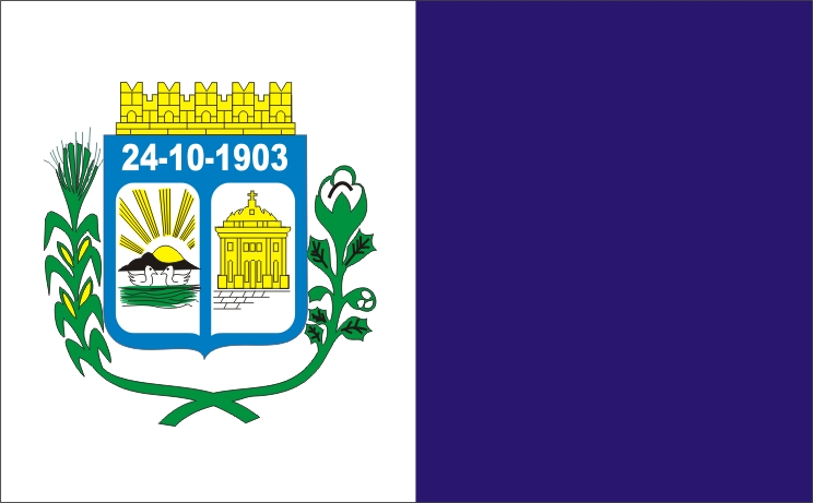 Bandeira de Patos, Paraíba.